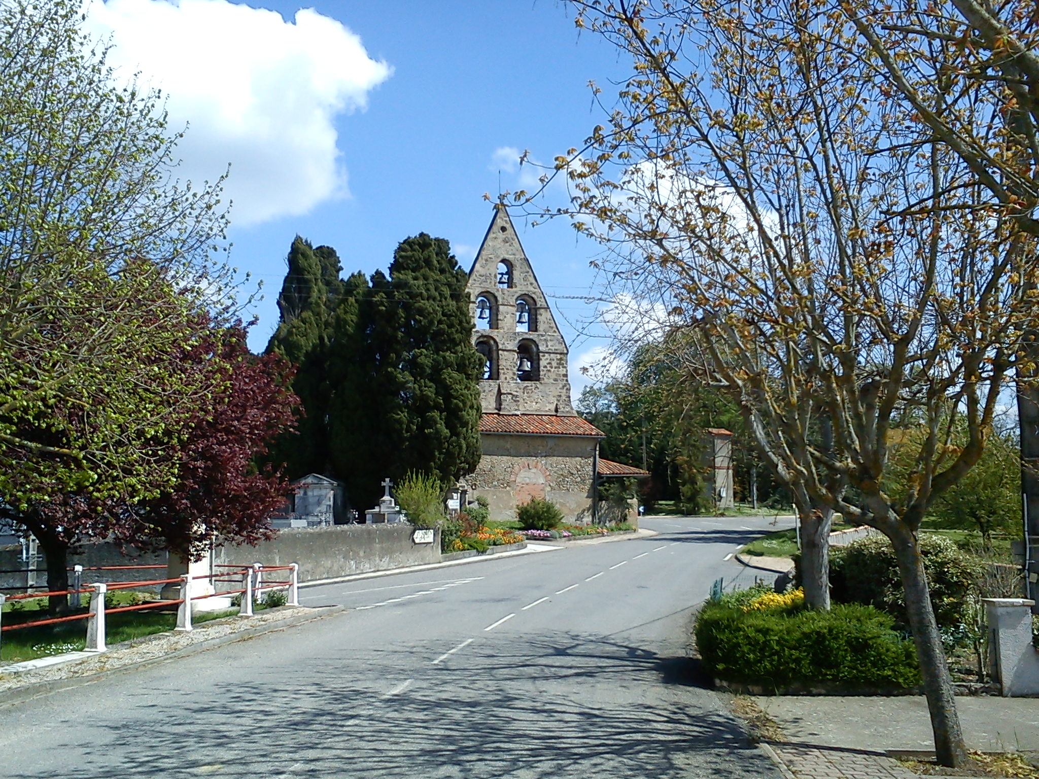 Église de Samouillan